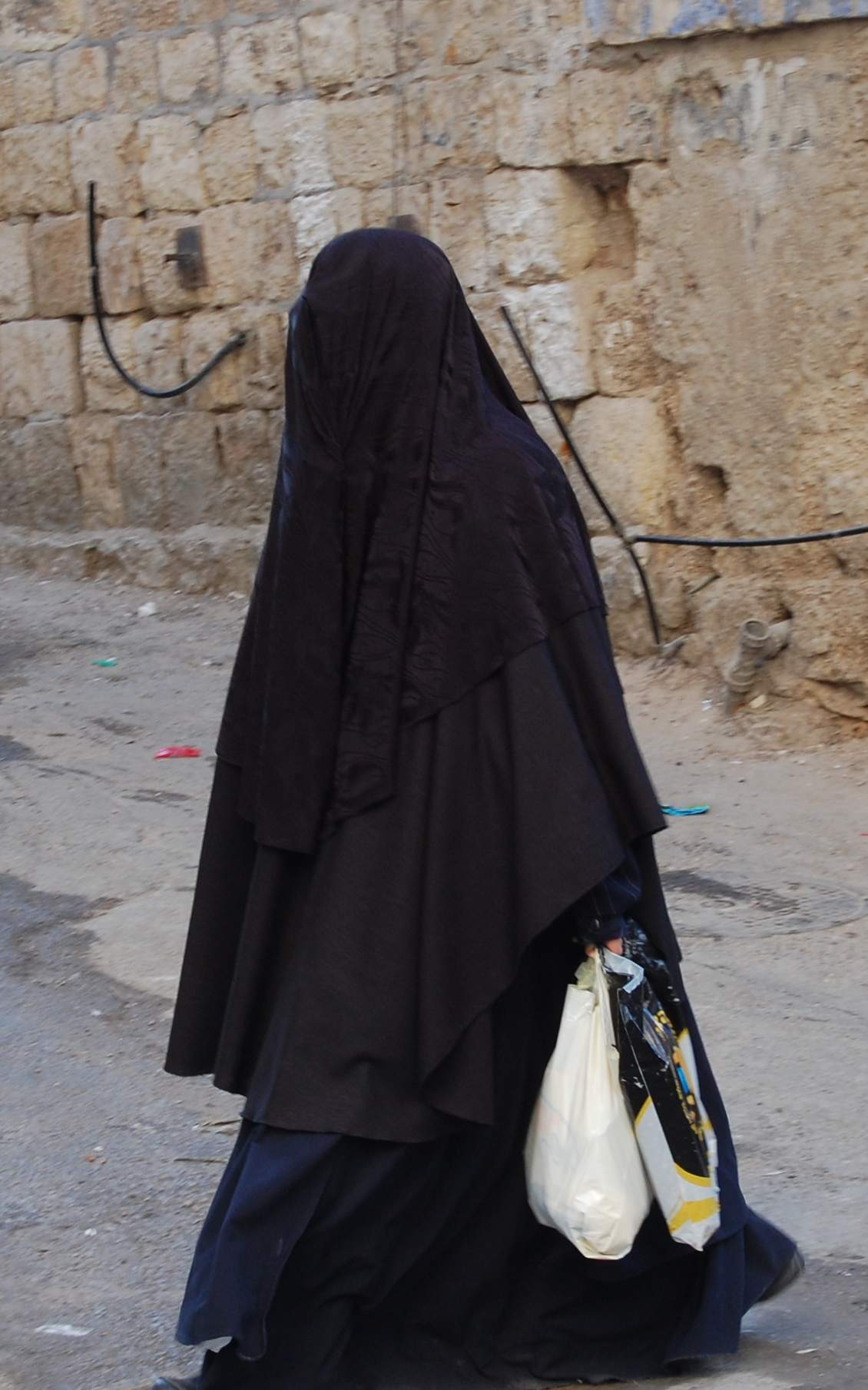 נשות השלים, מאה שערים